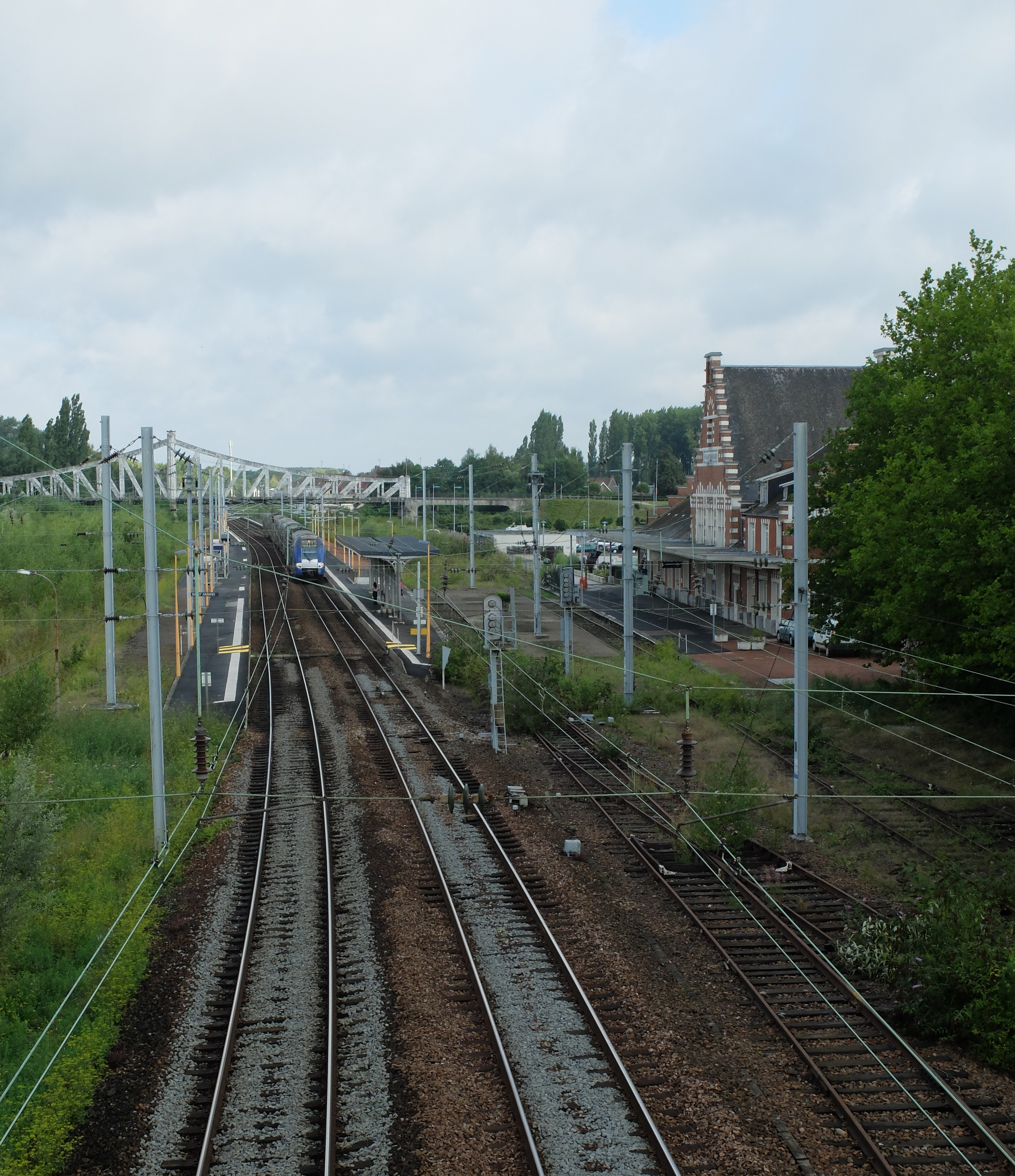 Vue d'un TER entrant en gare de Saint-Amand-les-Eaux.